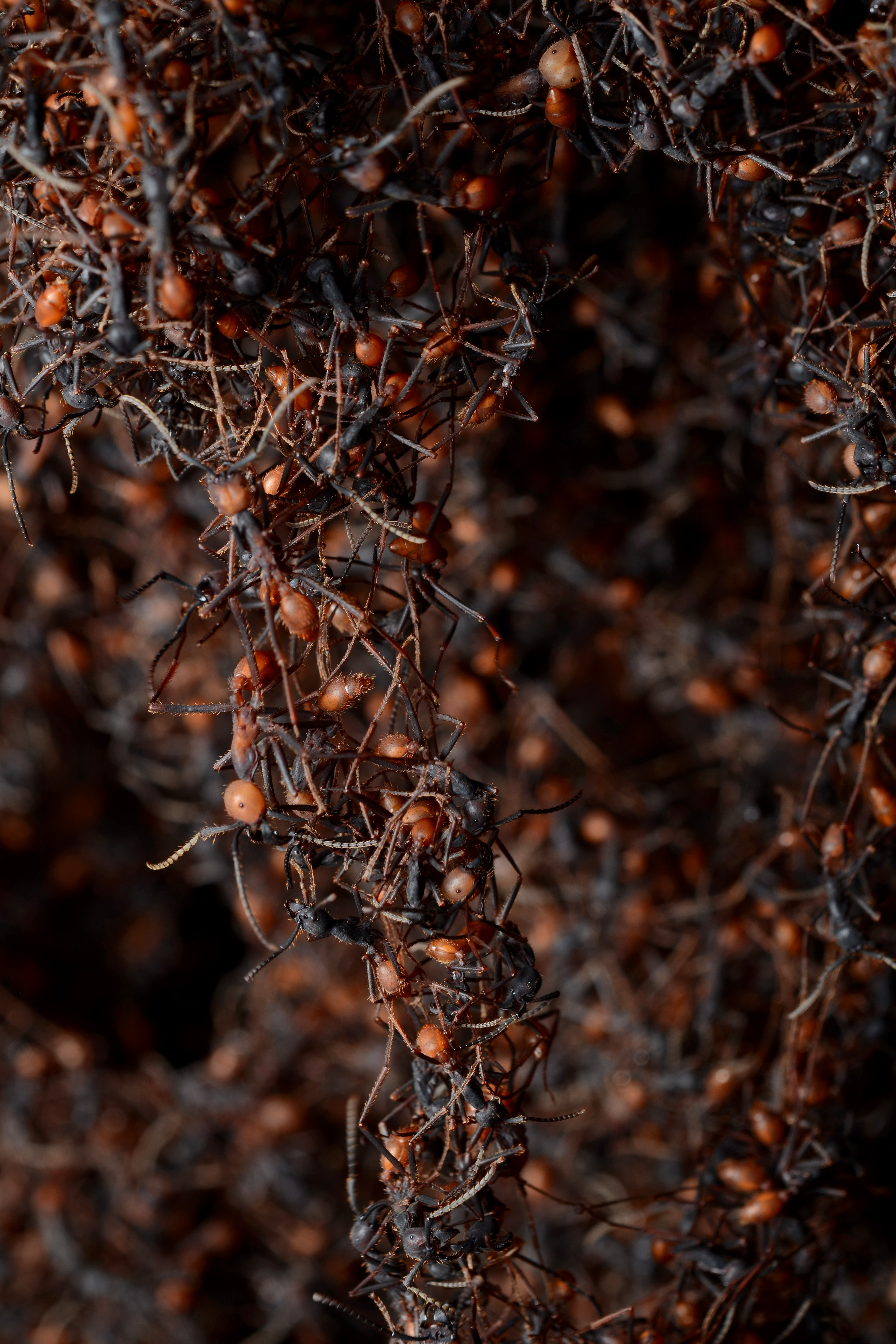 Formicidae: Eciton sp.